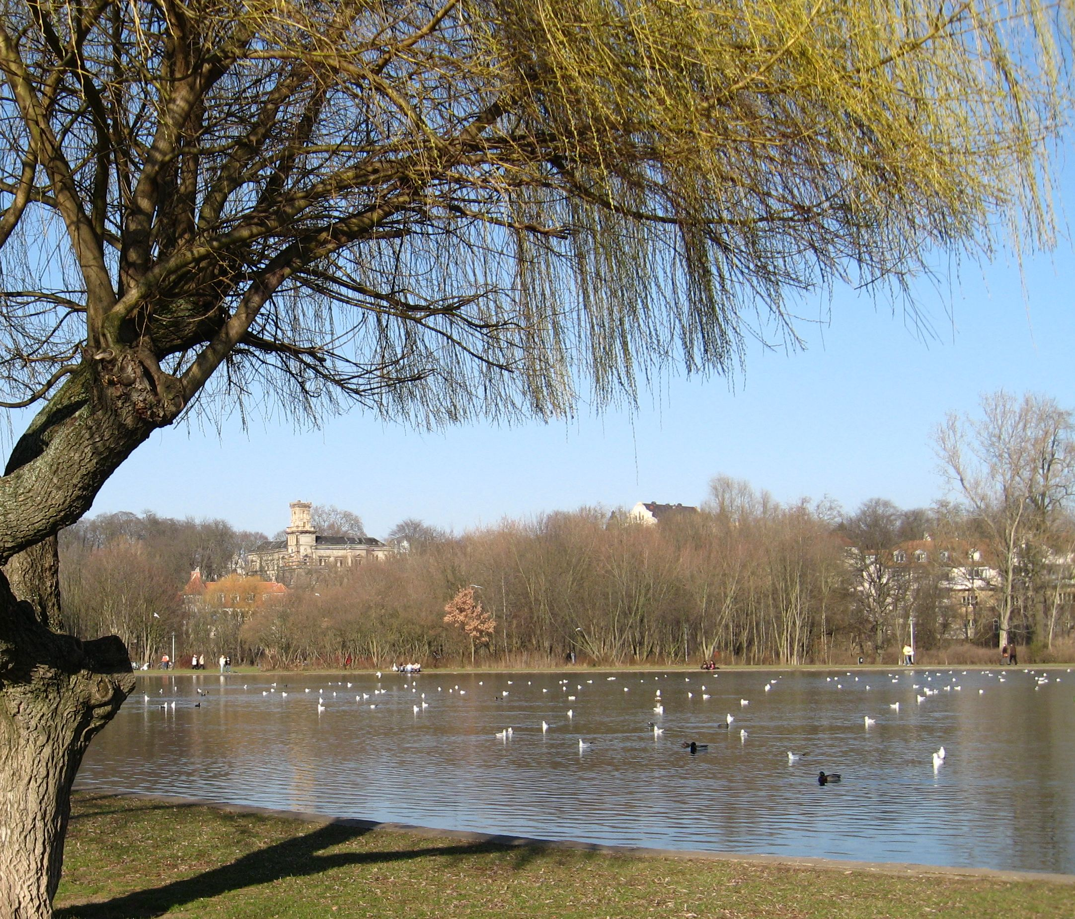 Blick von der Peißnitz in Halle (Saale).